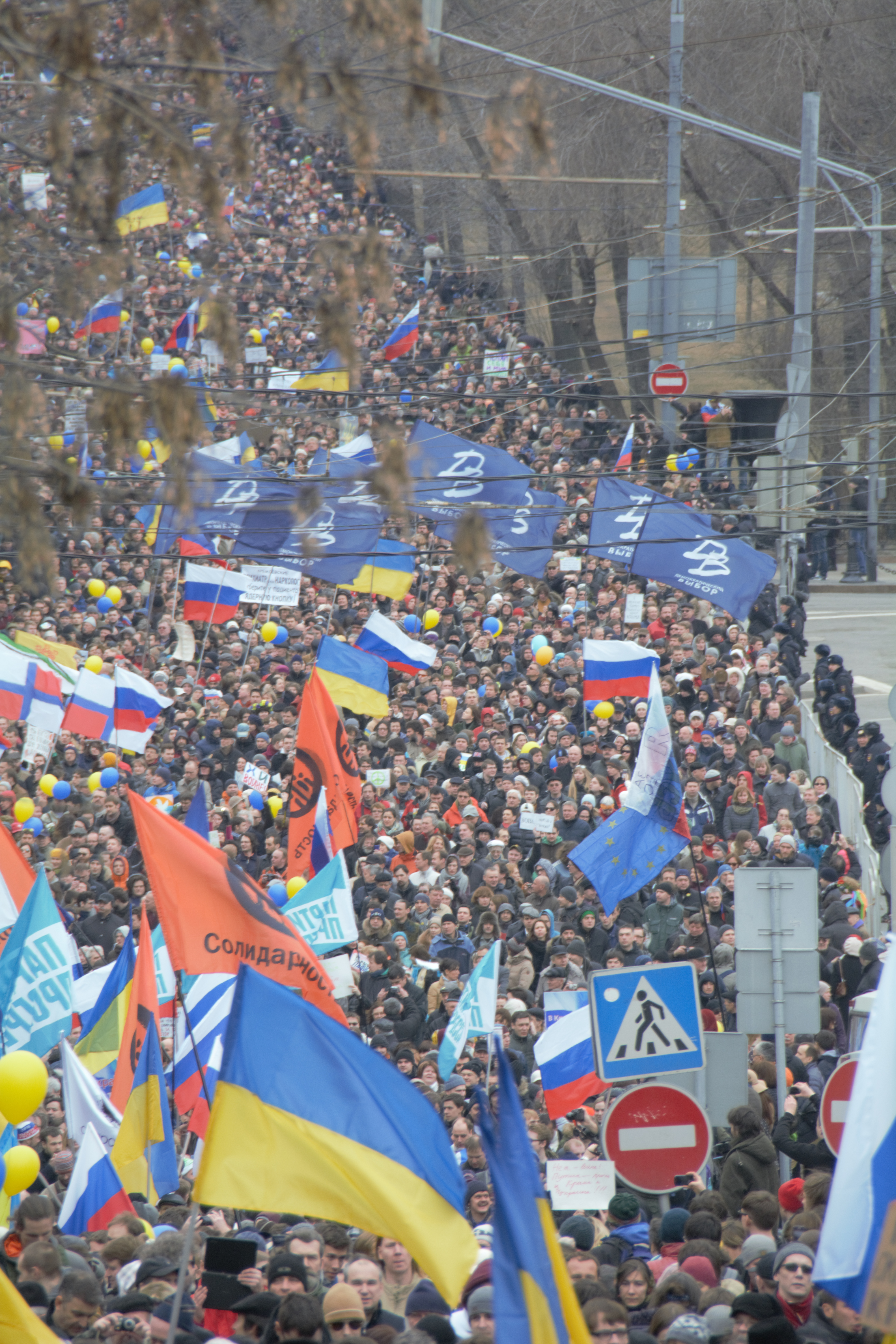 Марш за мир и свободу, общий план